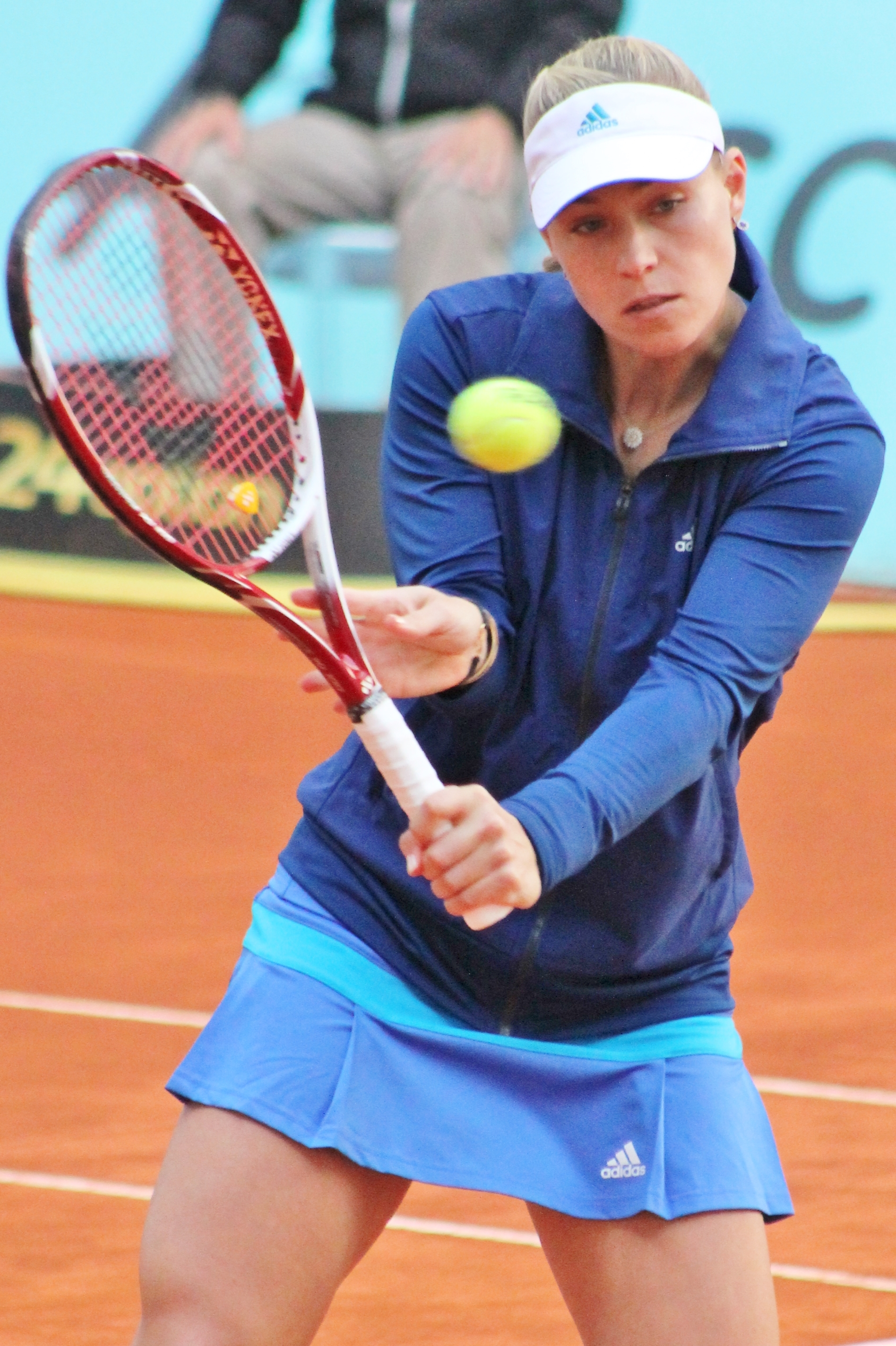 Kerber MA14 (4)